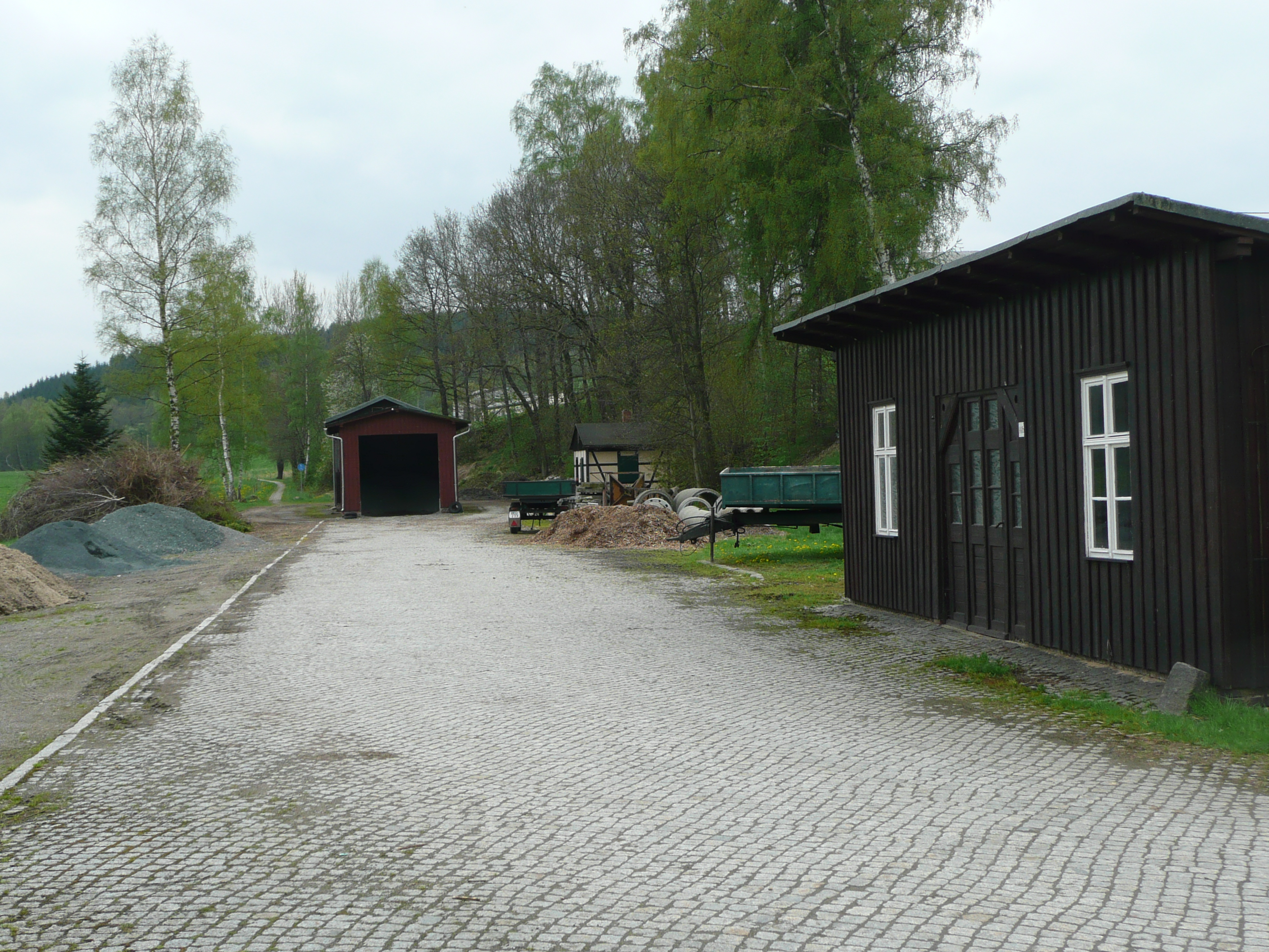 Foto von dem ehemaligen Bahnhofsareal in Voigtsdorf